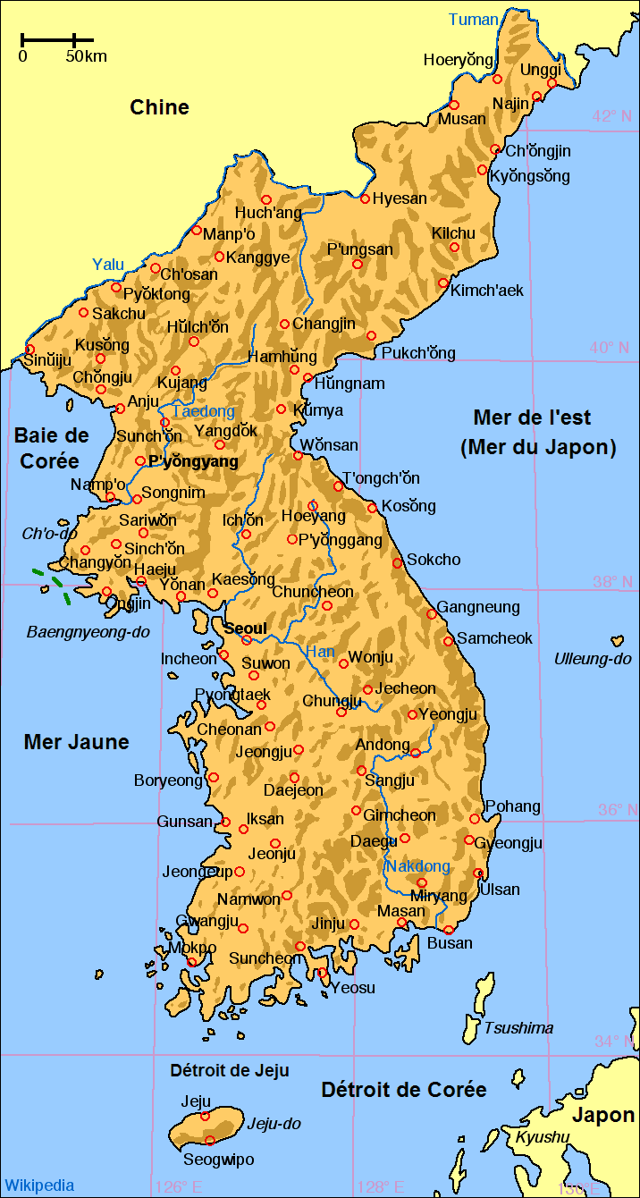 Carte de Corée copiée du wikipedia anglais. Dessinée par User:Kokiri et traduite par Utilisateur:Junming